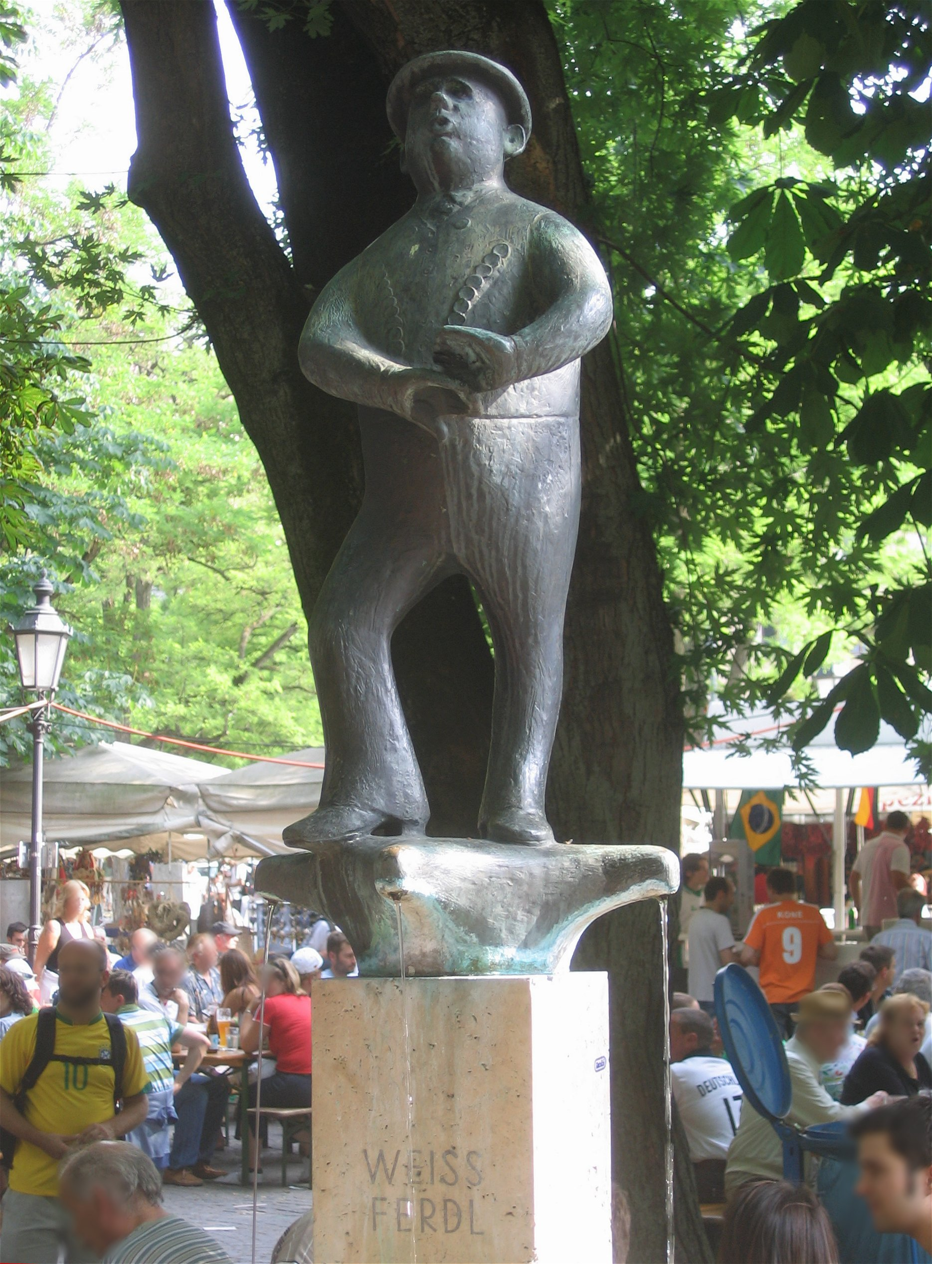 Weiß-Ferdl-Brunnen auf dem Viktualienmarkt in München, von Josef Erber, 1953